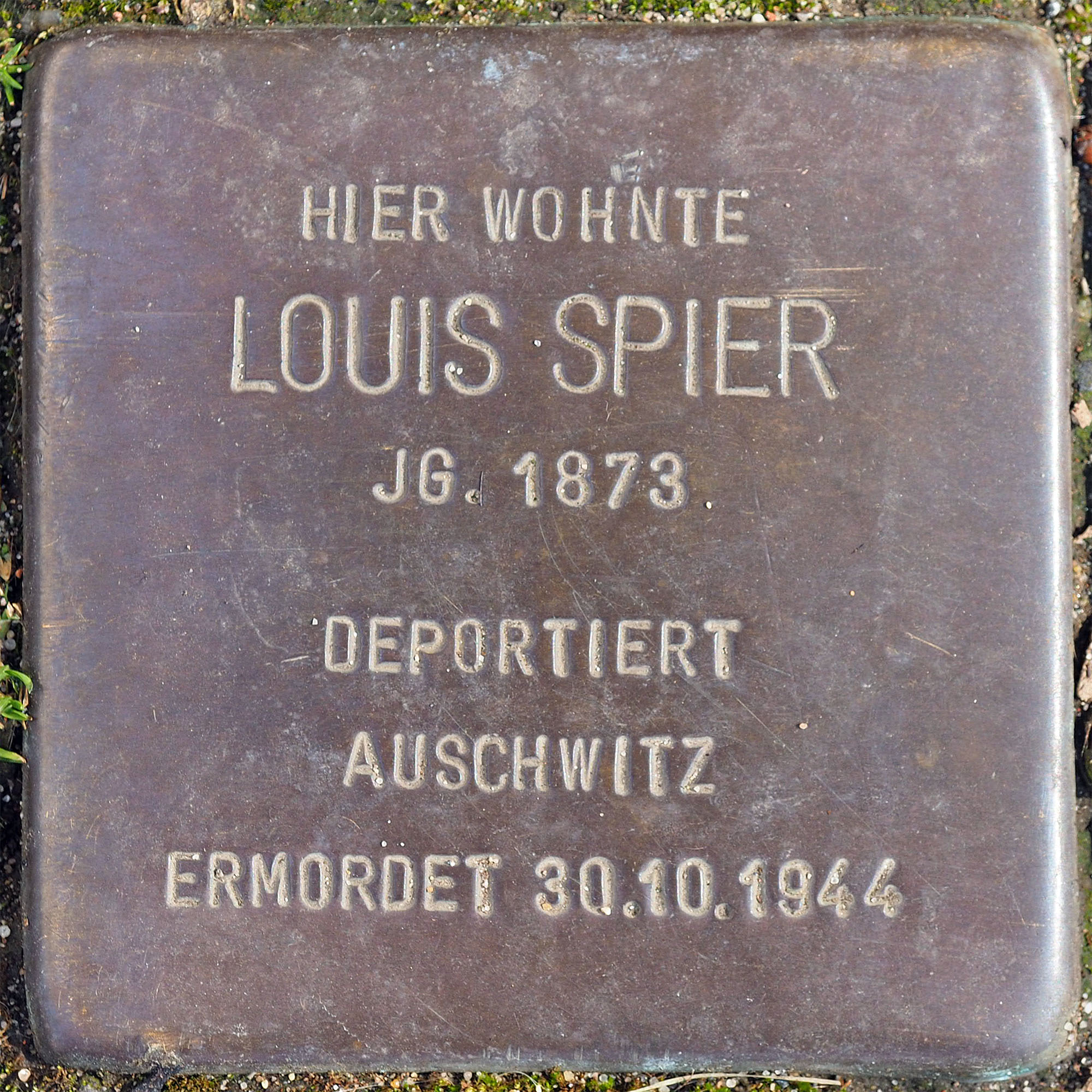 Stolpersteine MG: Spier, Louis